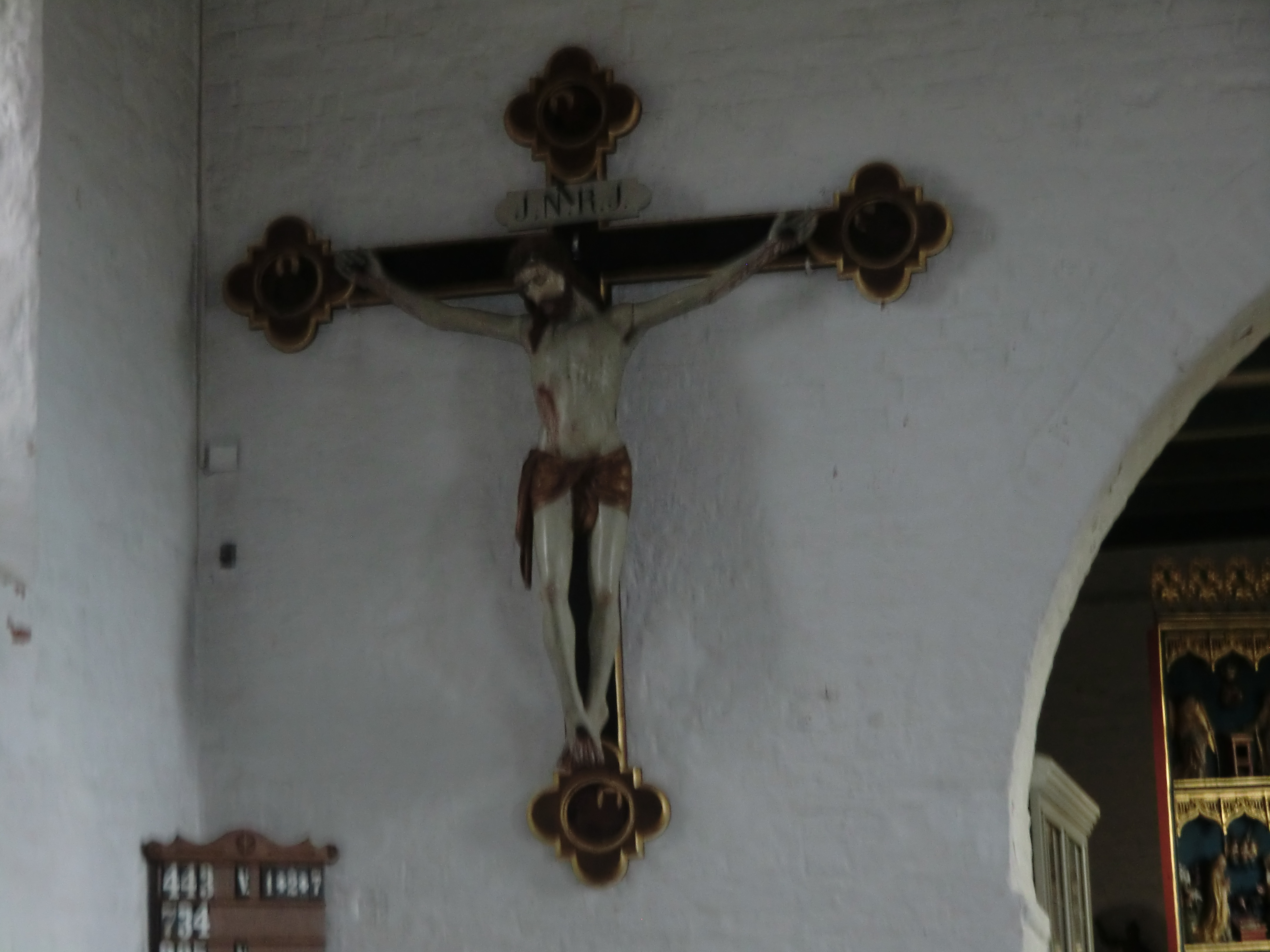 Triumpfkreuz